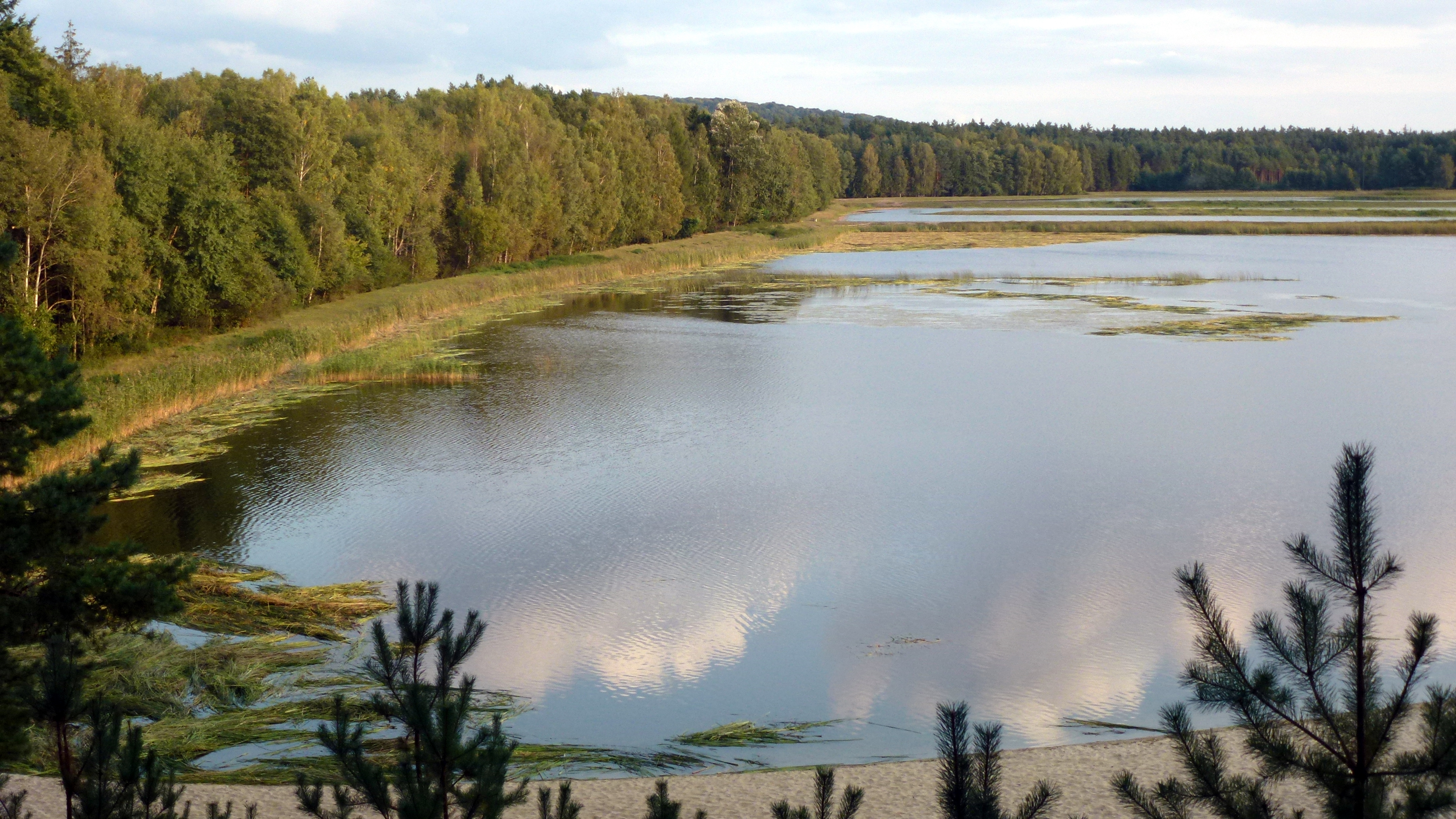 Stawy Echo, Roztoczański Park Narodowy